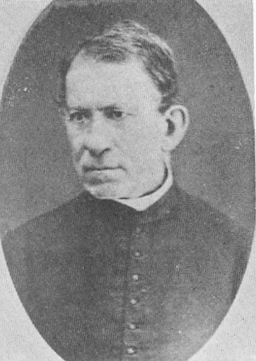 Xavier Montrouzier (1821-1897) est un missionnaire et explorateur naturaliste français.